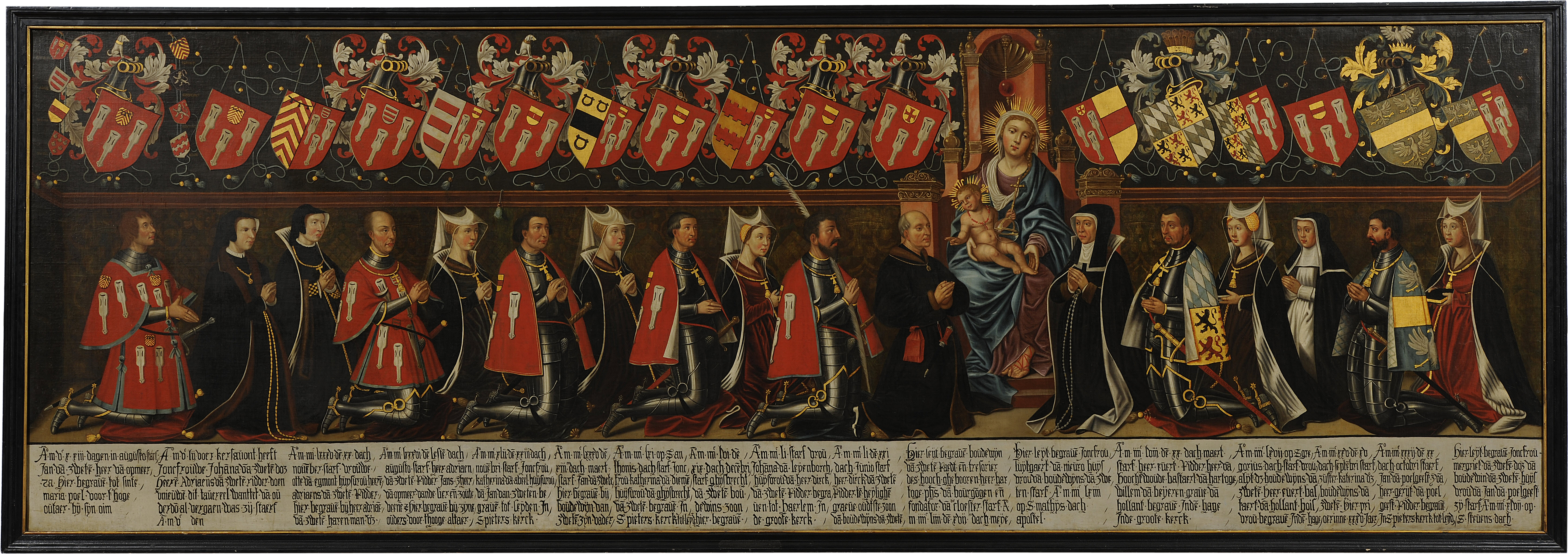 Memorietafel van Boudewijn van Swieten en zijn geslacht. Gemaakt ter nagedachtenis aan het echtpaar Boudewijn van Swieten en Lutgard van Nijenrode, hun kinderen en hun schoonfamilie. Het was oorspronkelijk geplaatst bij het ouderlijk graf in de kapel van het in 1428 door Van Swieten gestichte klooster Mariënpoel in de omgeving van Leiden. De oorspronkelijke memorietafel werd waarschijnlijk kort na de dood van Boudewijn van Swieten geschilderd. In 1552 werd het tafereel vernieuwd. Aan de linkerzijde werden de twee kinderen van Van Swietens kleinzoon Adriaen toegevoegd. Ieder mannelijk familielid draagt een herautenmantel met daarop zijn familiewapen. Maria kreeg als patrones van het klooster een centrale plek op het paneel.